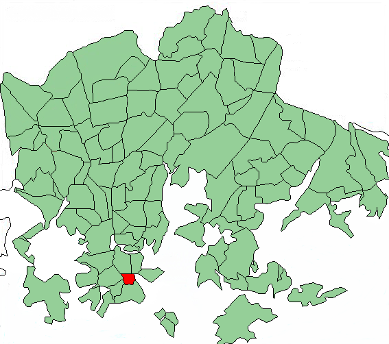 Map of Helsinki highlighting Kaartinkaupunki